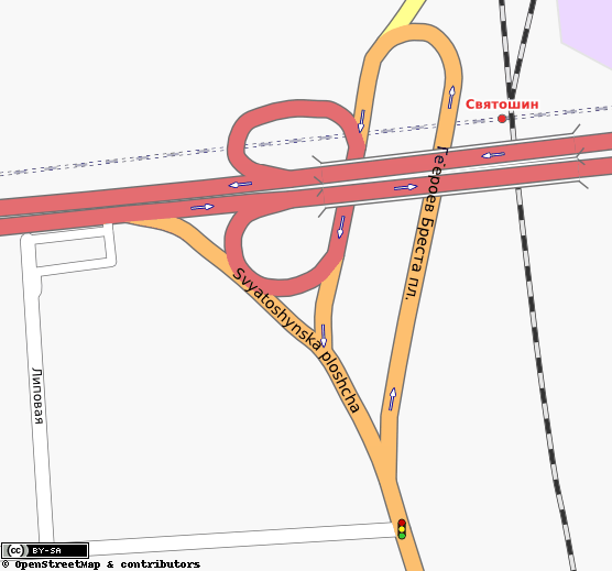 Героїв Бреста площа